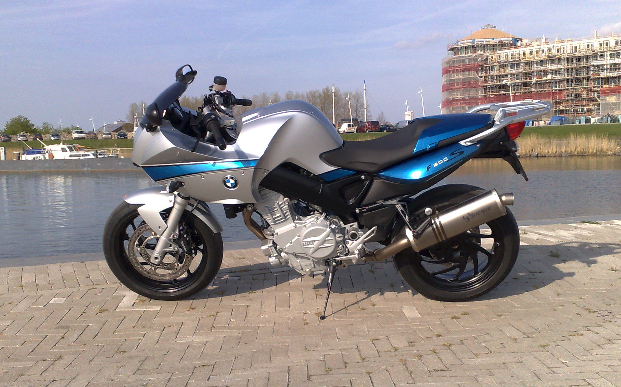 BMW F 800 S Sport Edition: - BMW Motorrad ABS - Boordcomputer - Witte knipperlichten - Duo-kleurstelling Titansilber / Cosmicblau - Getinte ruit - Buddyseatcover - Akrapovic sportuitlaat - Type plaatje